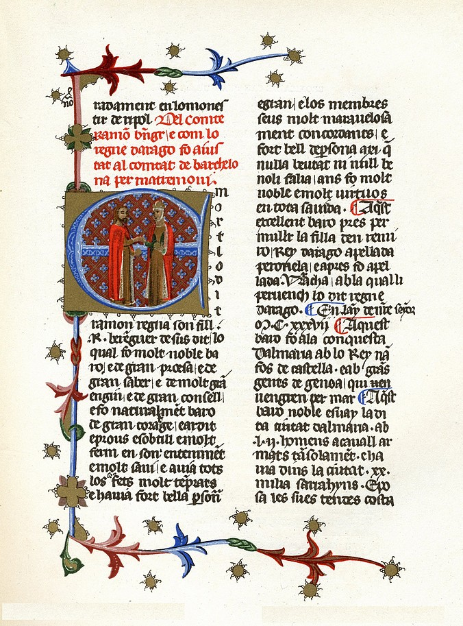 Crònica dels reys dArago e Comtes de Barcelona/Crónica Pinatense/Crónica de San Juan de la Peña. Manuscrito nº 17, folio 24 r